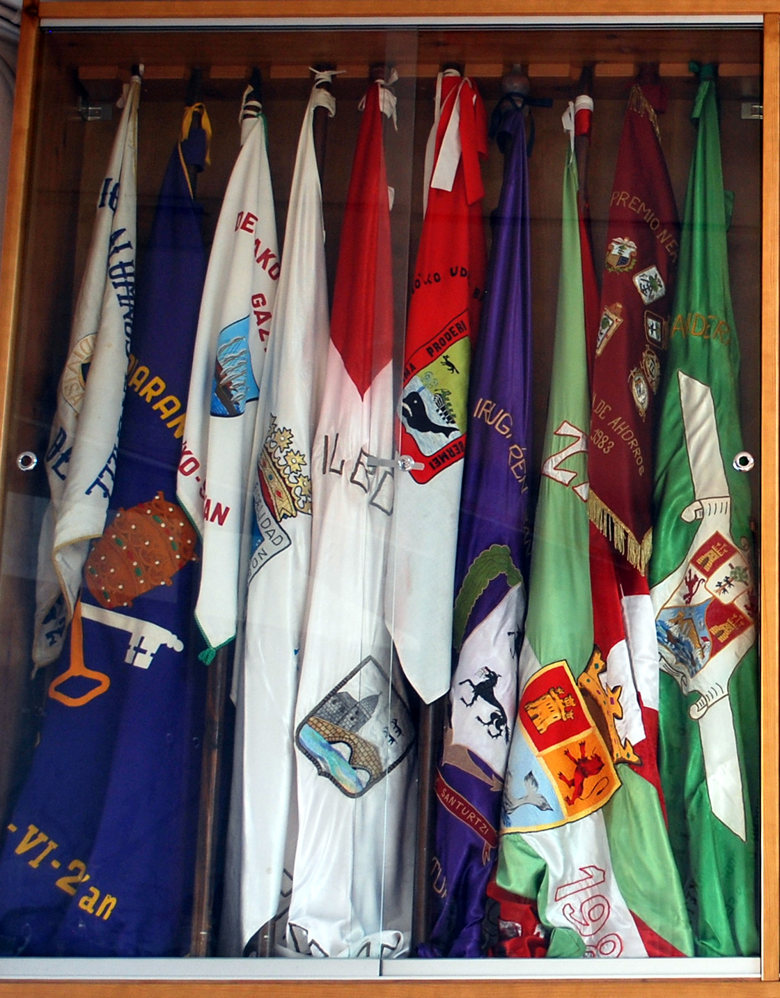 Drapeaux gagnés par Zumaia (Guipuscoa)